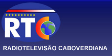 Logo von